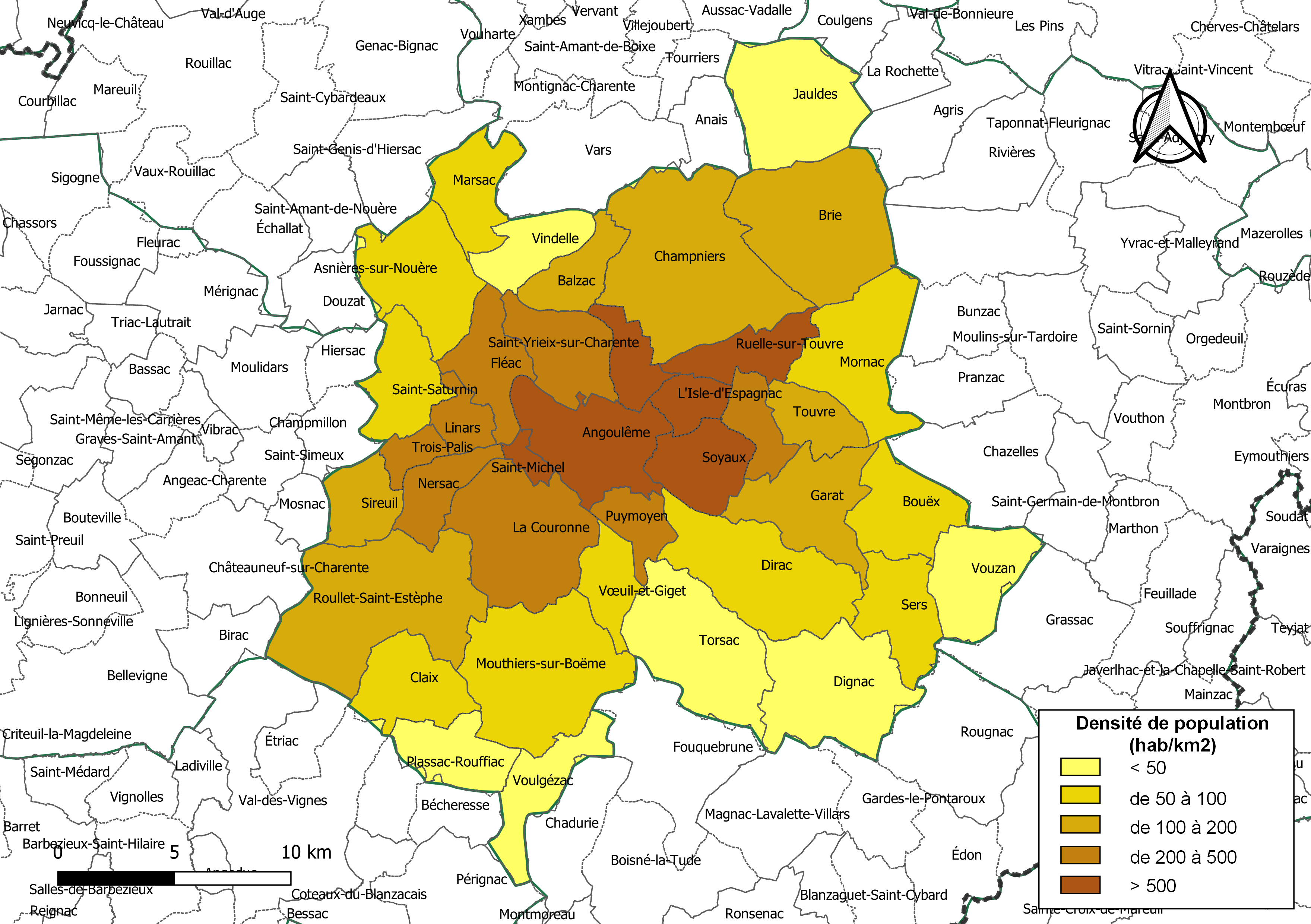 Carte des densités de population (millésimée 2016) des communes de la communauté de communes l'intercommunalité Grand Angoulême, département de la Charente, France. Composition au 1er janvier 2019.